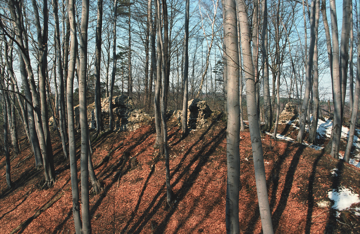 Udórz